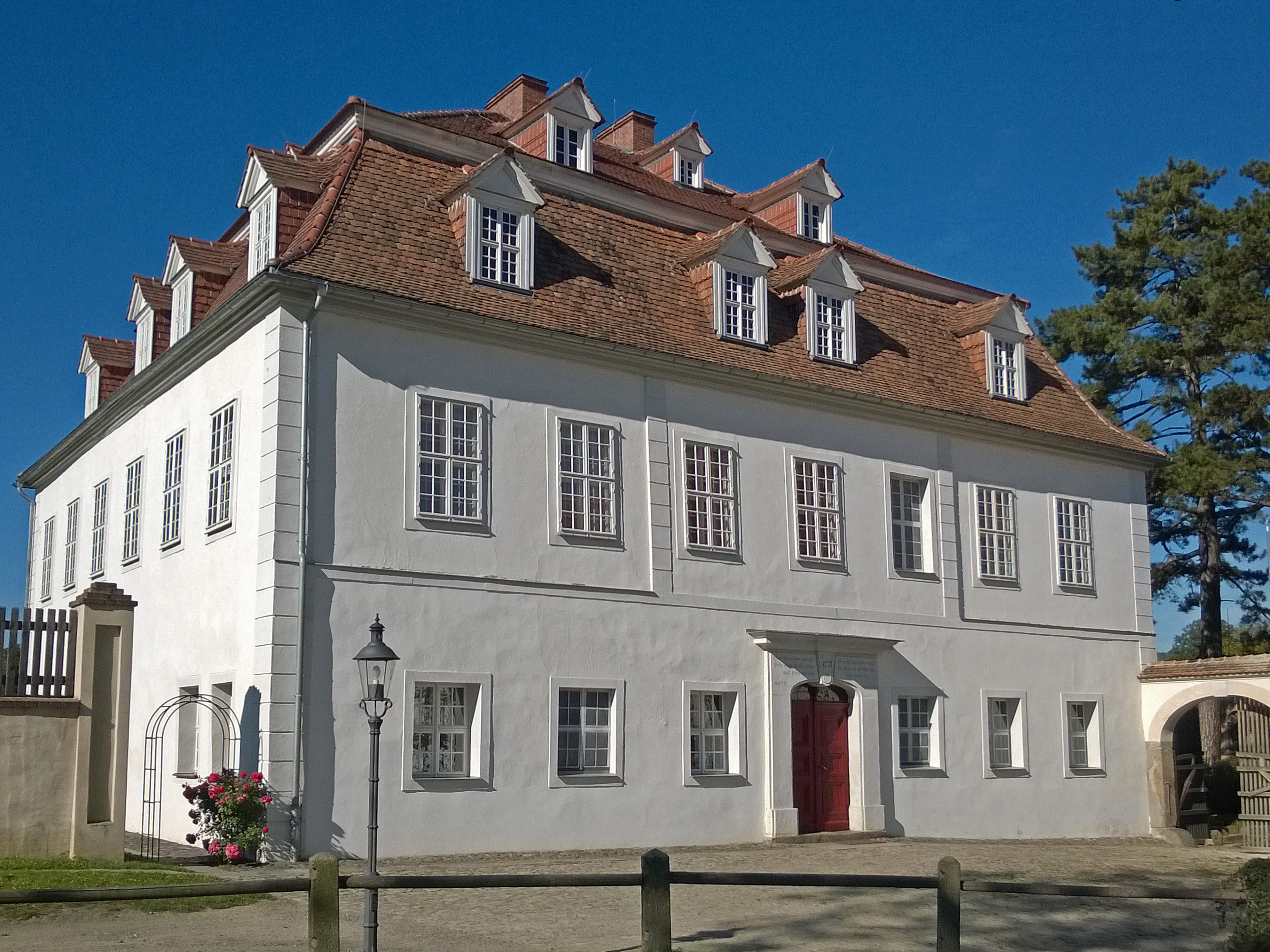 Schloss Berthelsdorf (Hofseite)